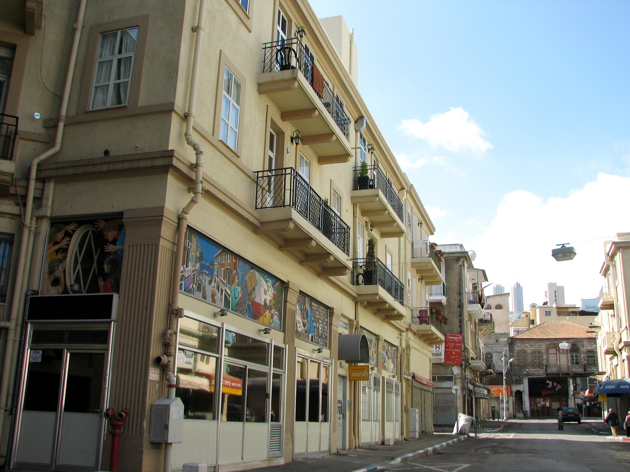 The old commercial center in Jaffa Street, Haifa. Israel המרכז המסחרי הישן. נפתח בשנת 1927, בשטח שהשתרע מרחוב יפו לכוון הים מול כיכר חמרה. זה היה המבנה הראשון בחיפה אשר יועד מלכתחילה למסחר. בחלק מהרחובות פעל במשך שנים רבות שוק שנקרא "השוק הטורקי".